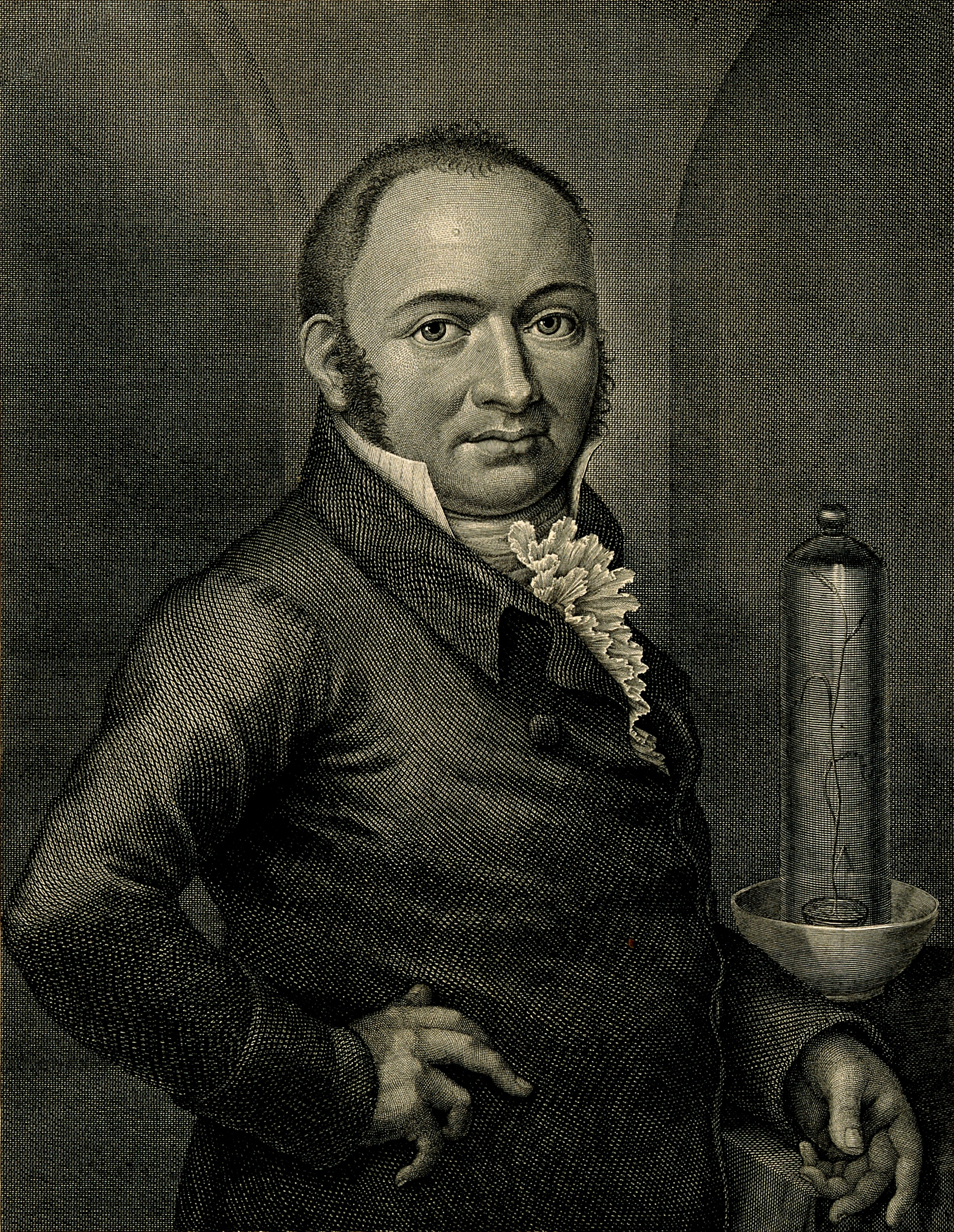 Sigismund Friedrich Hermbstädt. Line engraving by G. A. Lehmann, 1808, after himself. Iconographic Collections Keywords: portrait prints; Sigismund Hermstädt; engravings